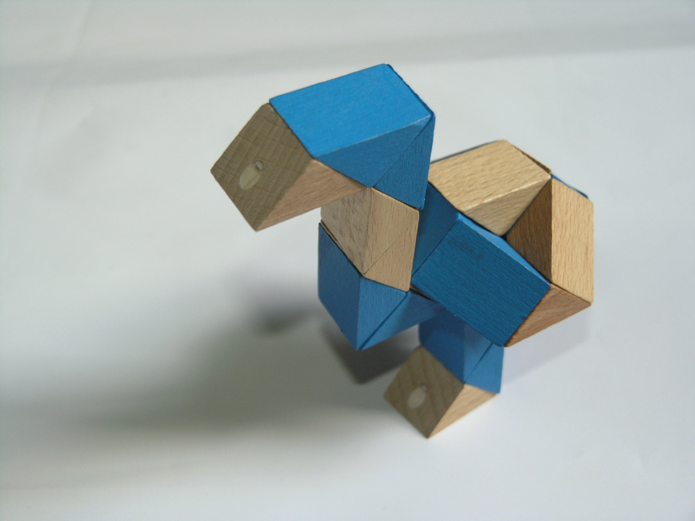 Rubik's Snake